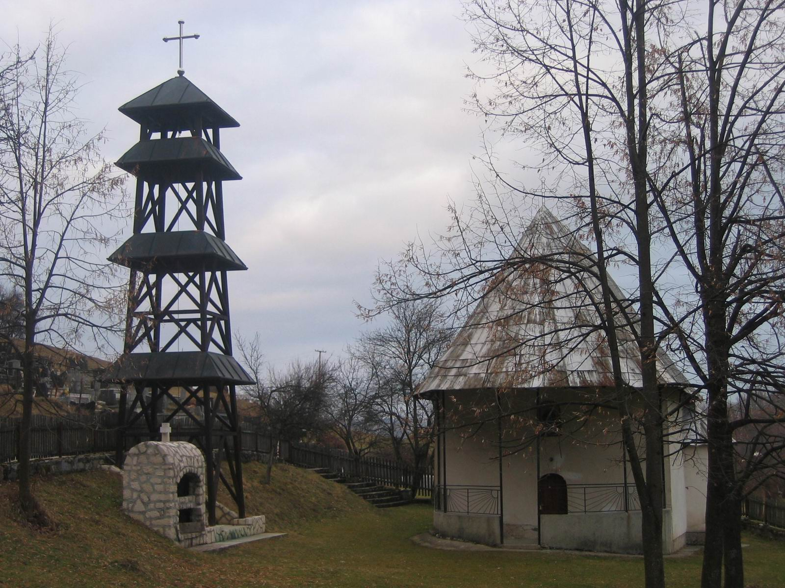 Crkva u selu Stapari, Uzice